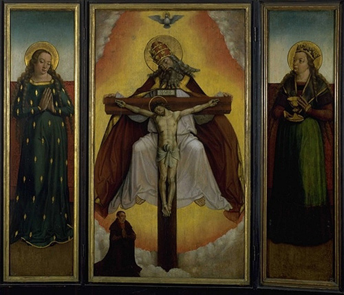 Oltářní retabulum s triptychem Nejsvětější Trojice se sv. Barborou a Pannou Marií Klasovou (Mistr Litoměřického oltáře, 1510–1520)